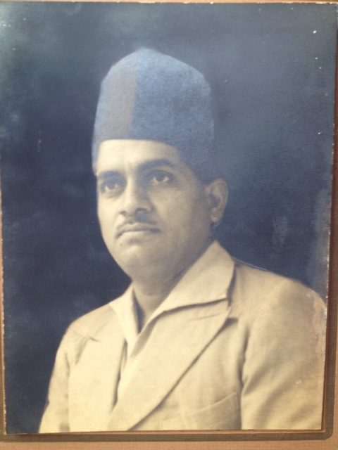 ogirala Ramachandra Rao